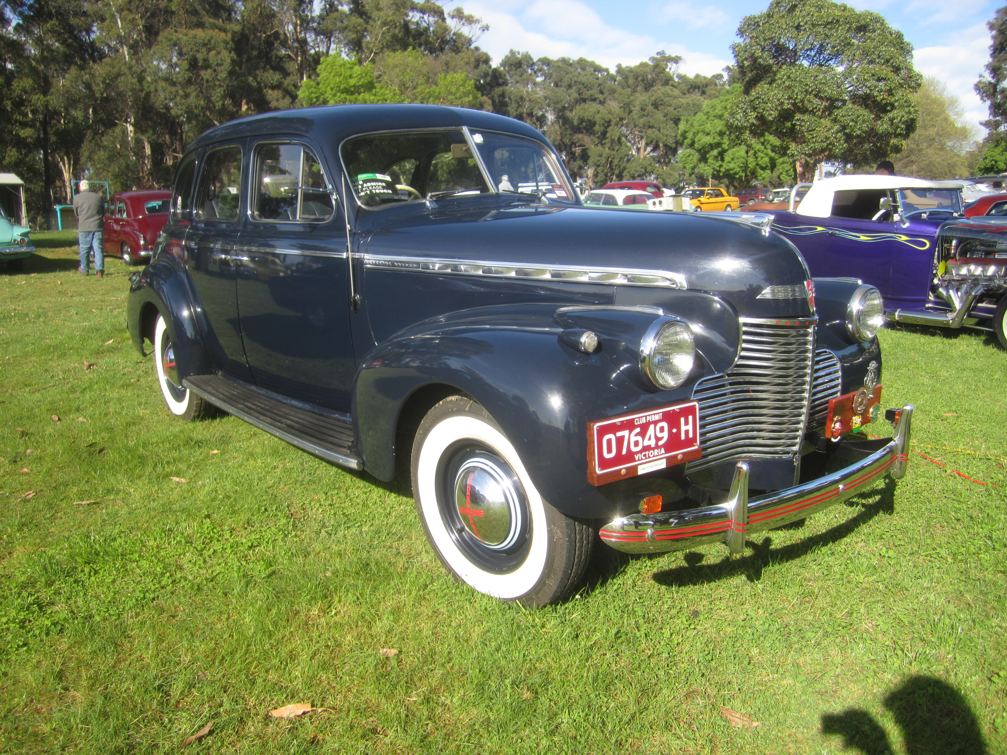 Available in Master Deluxe & Special Deluxe Engine; 216 cu in blue flame 6